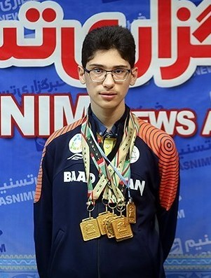 علیرضا فیروزجا در مصاحبه با خبرگزاری تسنیم